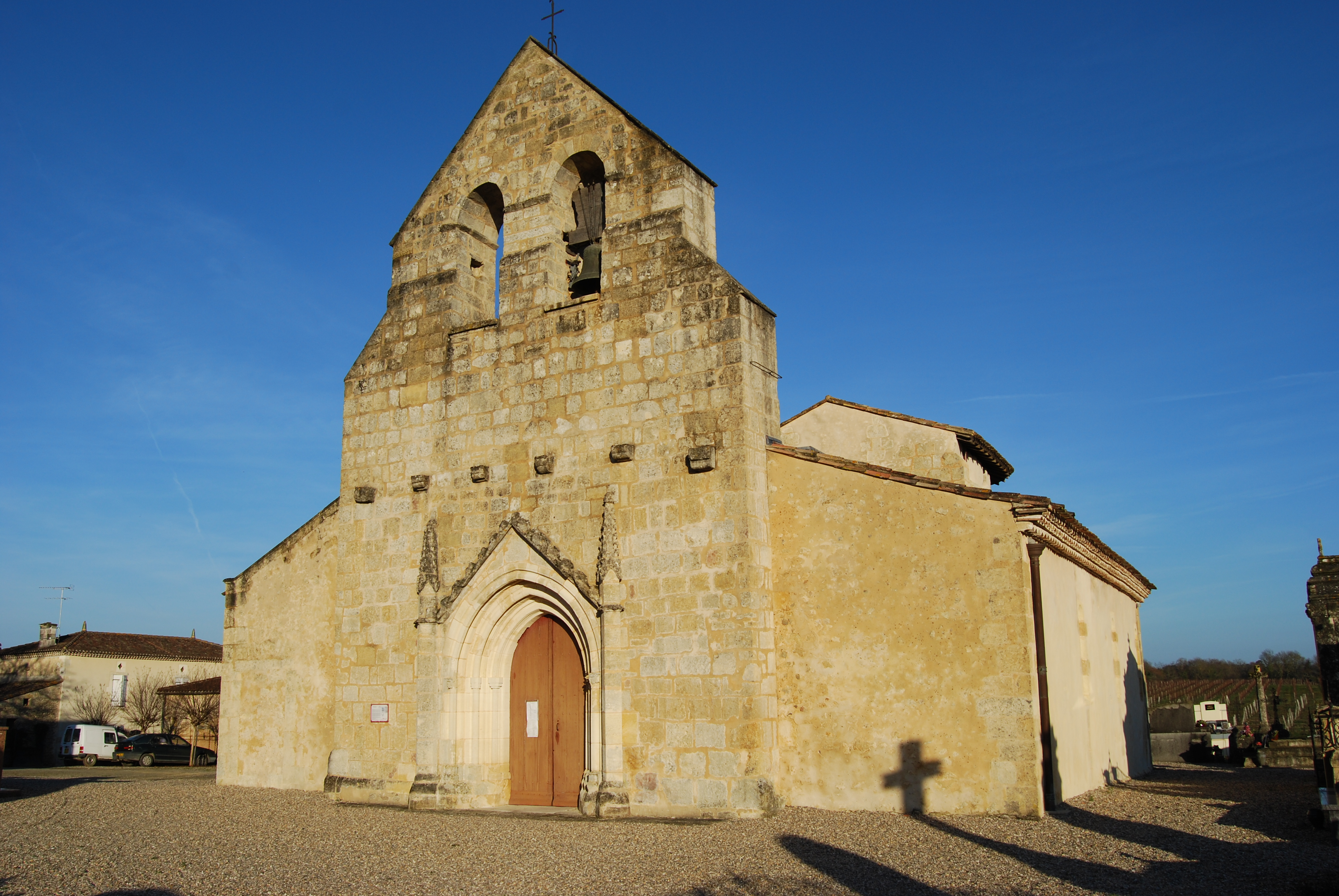 Église Saint-Martin de Ladaux, (Inscrit, 1925)